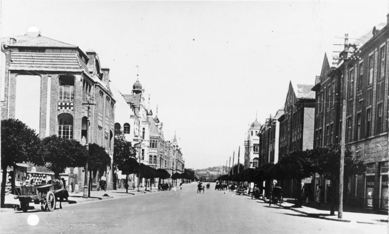 Eine Erinnerung an die tapfere Verteidiung der deutschen Festung Tsingtau im fernen Osten! Am 7. November 1914 fiel nach einer elfwöchigen Belagerung undnach einer neuntägigen ununterbrochenen Beschießung durch Land- und Schiffsartillerie schwerster Kaliber und nach Erschöpfung sämtlicher Verteidigungsmittel Tsingtau, das deutsche Bollwerk im fernen Osten in die Hände der Japaner. 1923 wurde das ganze Gebiet Kiautschou durch den Vertrag von Washington an China zurückgegeben und das deutsche Eigentum freigegeben. Blick in die Hauptstraße von Tsingtau, der Hauptstadt von Kiautschou, welche einen rein deutschen Charakter trägt.